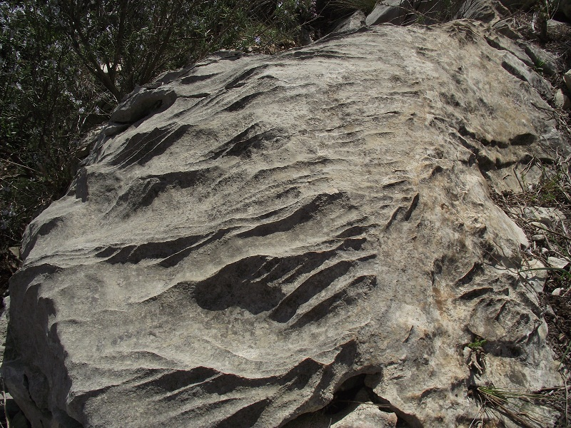 Roche bathonien karstique Malmont (Draguignan, Var, France)